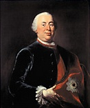 Gustav Adolf von Gotter